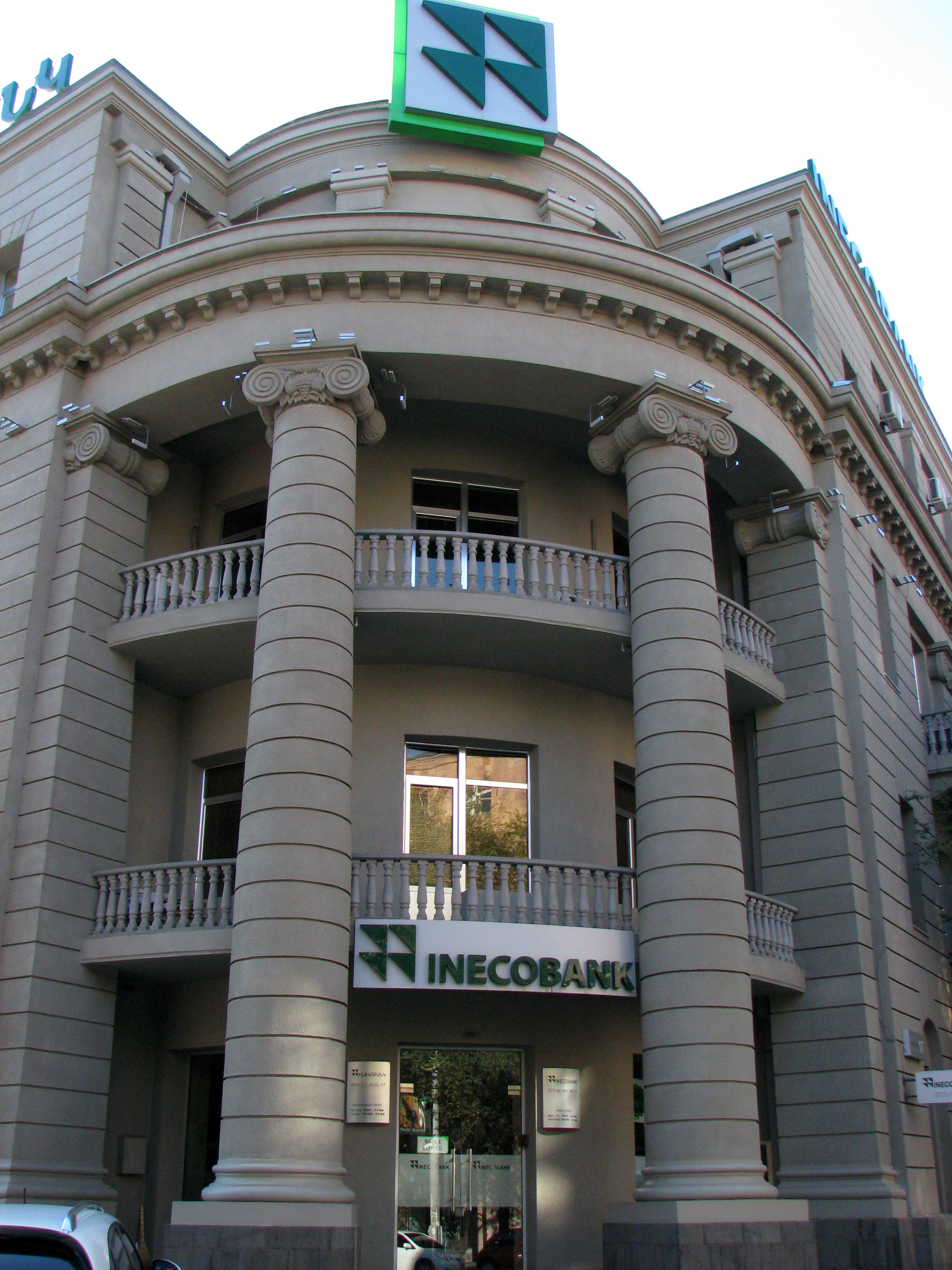 Հայկական սովետական հանրագիտարանի խմբագրության շենքը